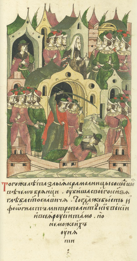 ЛИЦЕВОЙ ЛЕТОПИСНЫЙ СВОД В том году злые крамольники сошлись на вече брянском и убили своего князя Глеба Святославовича. Тогда же там был и Феогност, митрополит Киевский и всея Руси, но не смог их унять.